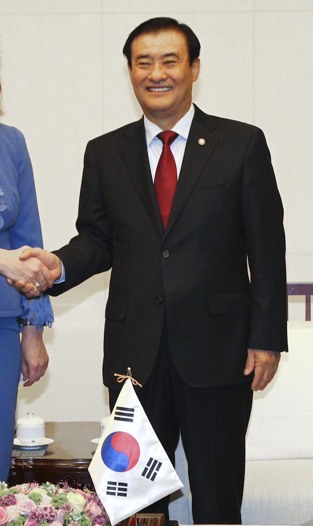 2013.gada 22.maijs. Saeimas priekšsēdētāja Solvita Āboltiņa oficiālās vizītes ietvaros Seulā tiekas ar Dienvidkorejas Nacionālās Asamblejas priekšsēdētāju Kanu Čanhi (Kang Chang-hee). Foto: Kim Chin Hyuk, Dienvidkorejas Nacionālā Asambleja